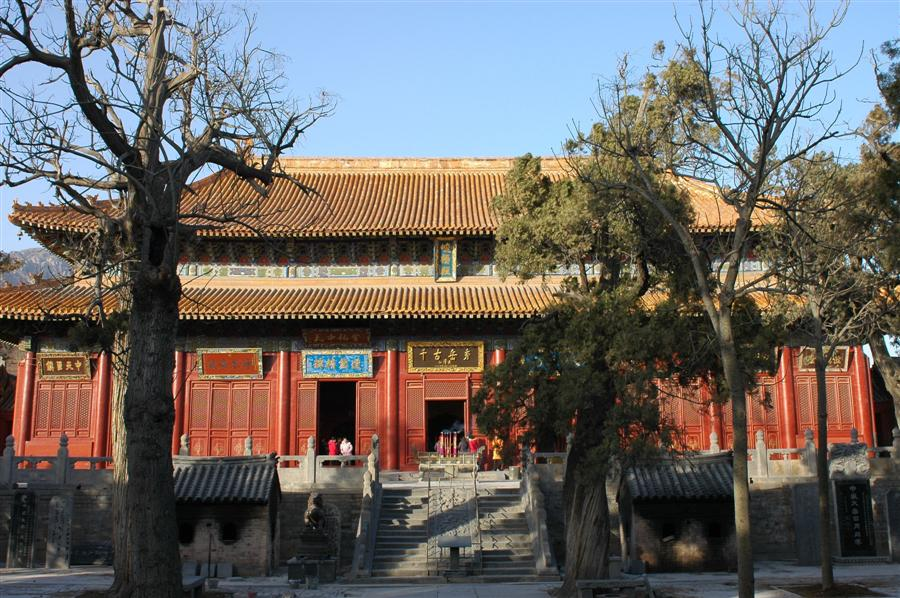 河南登封中岳庙